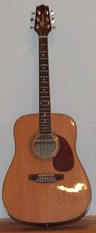 תמונה של גיטרה אקוסטית - התמונה צולמה בביתי במצלמה דיגיטלית